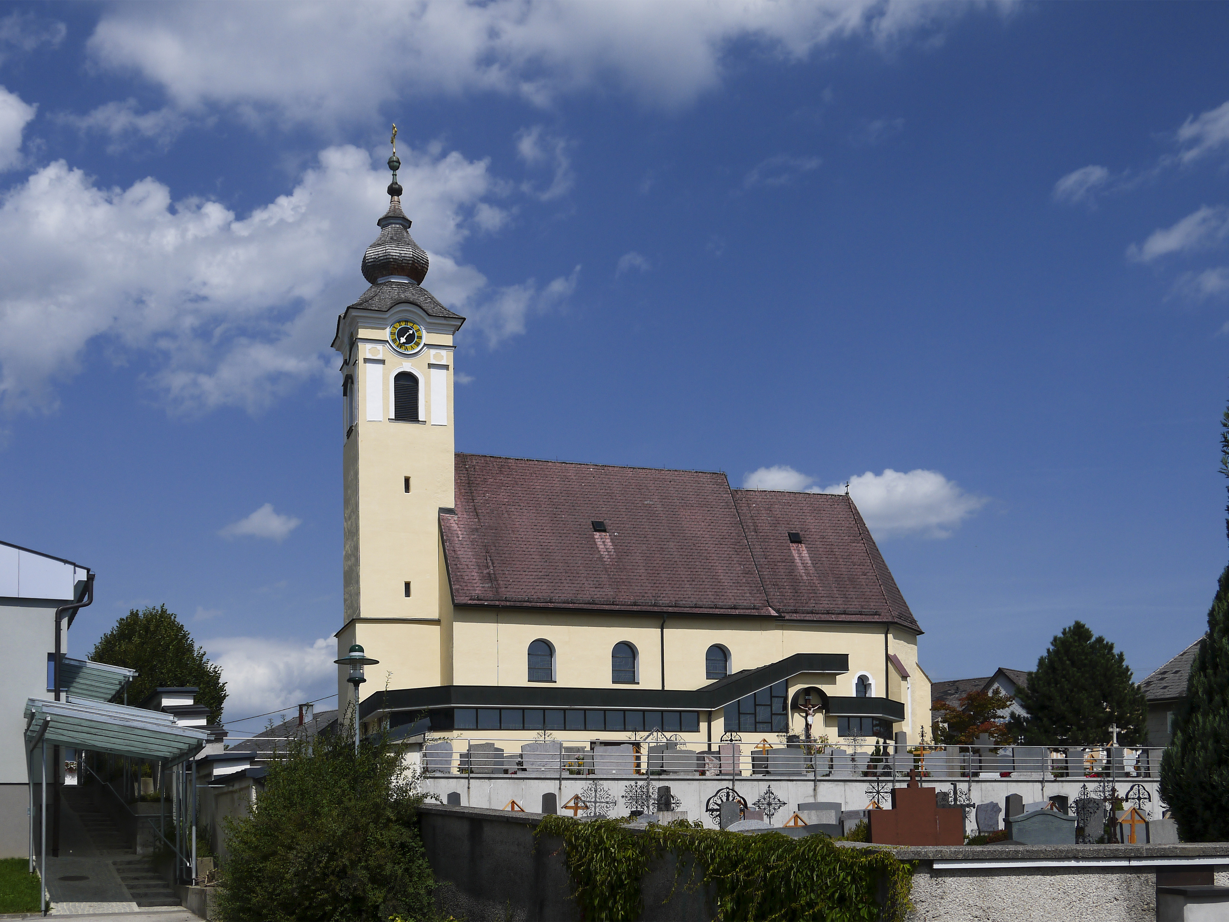 Kath. Pfarrkirche hl. Leonhard mit Friedhof